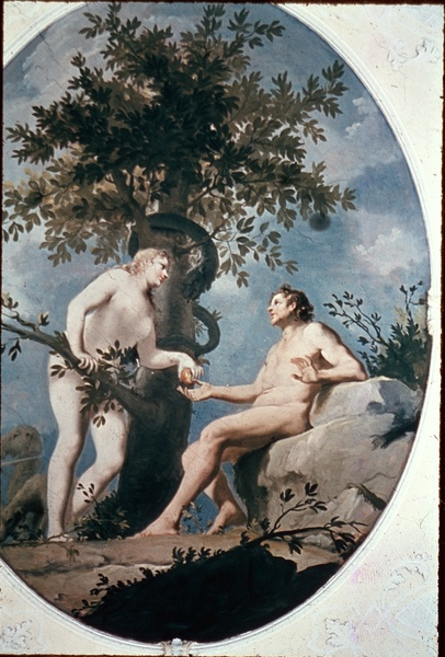 Sündenfall, Deckenbild, Ottobeuren, Benediktinerkloster SS. Theodor u. Alexander